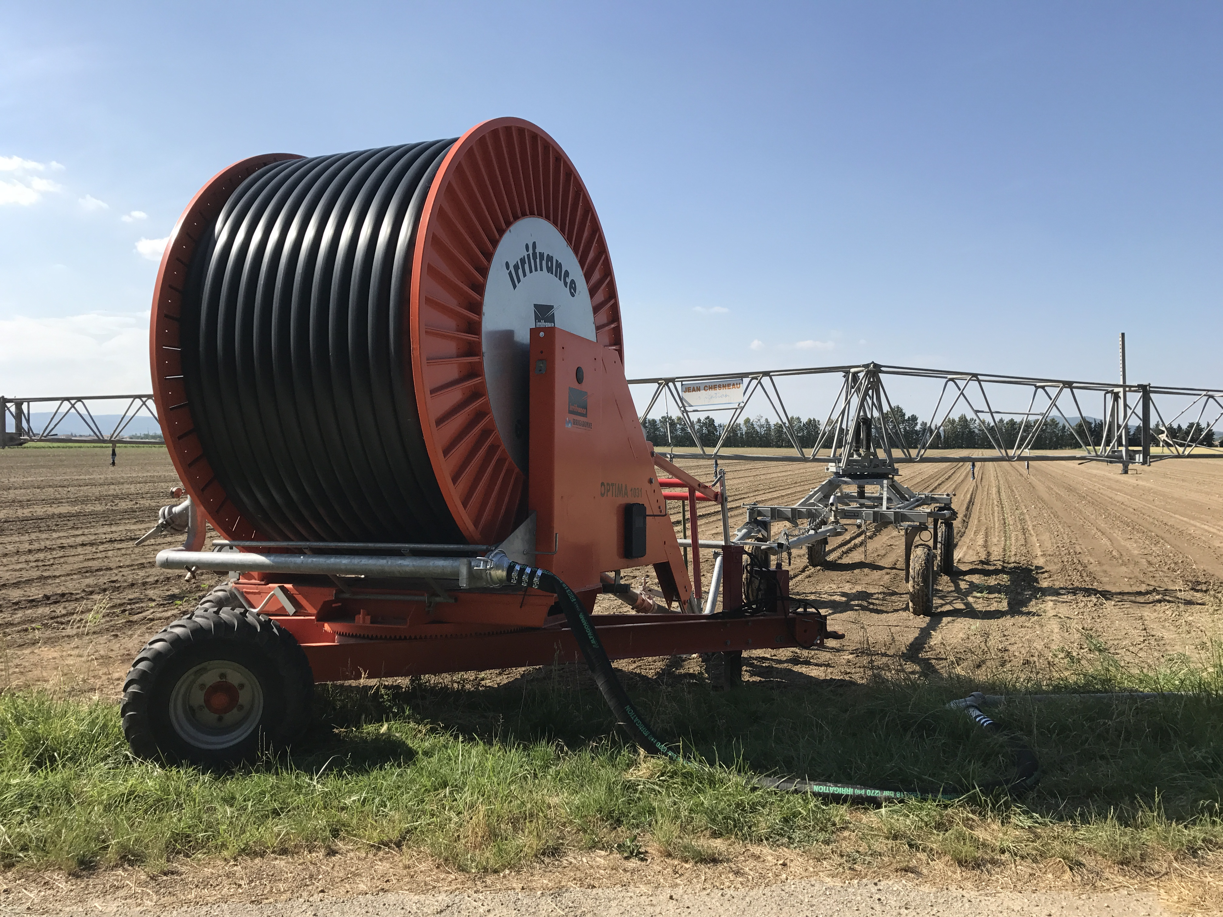 Irrigation agricole près de Pierrelatte.